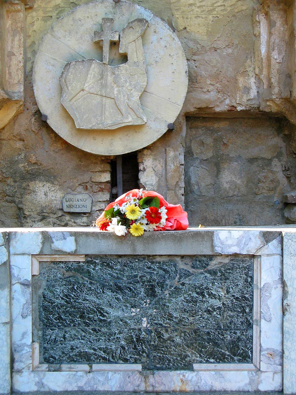 Parco Storico di Monte Sole